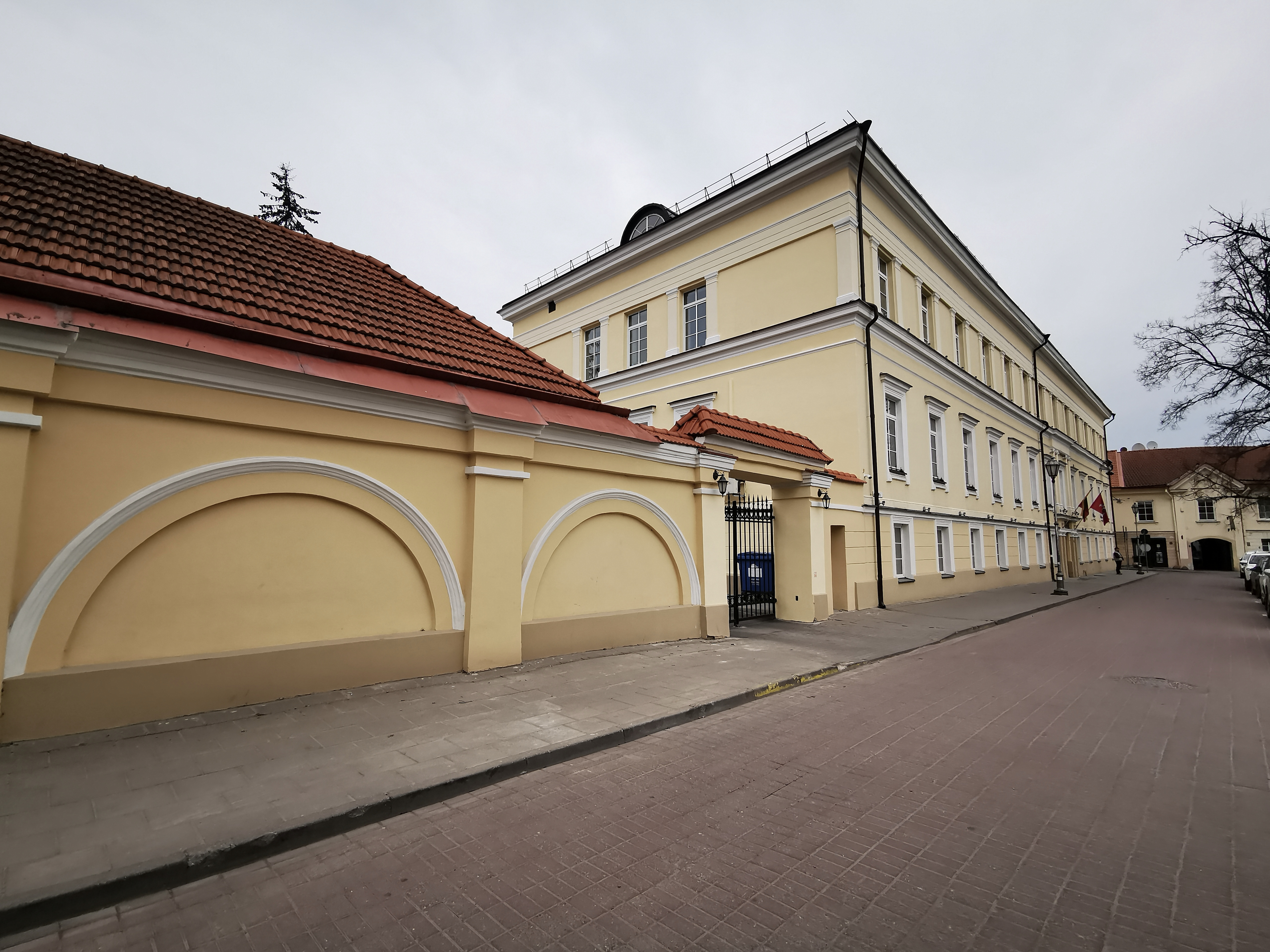 Lietuvos Respublikos švietimo, mokslo ir sporto ministerija Andriaus Volano g.